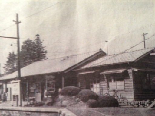 大久野駅写真